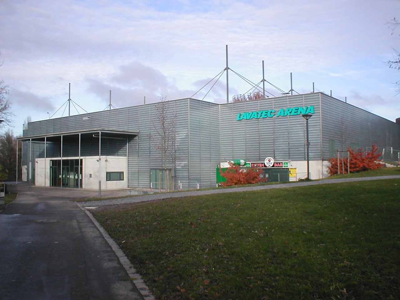 Lavatec Arena in Heilbronn, Spielstätte der Heilbronner Falken.